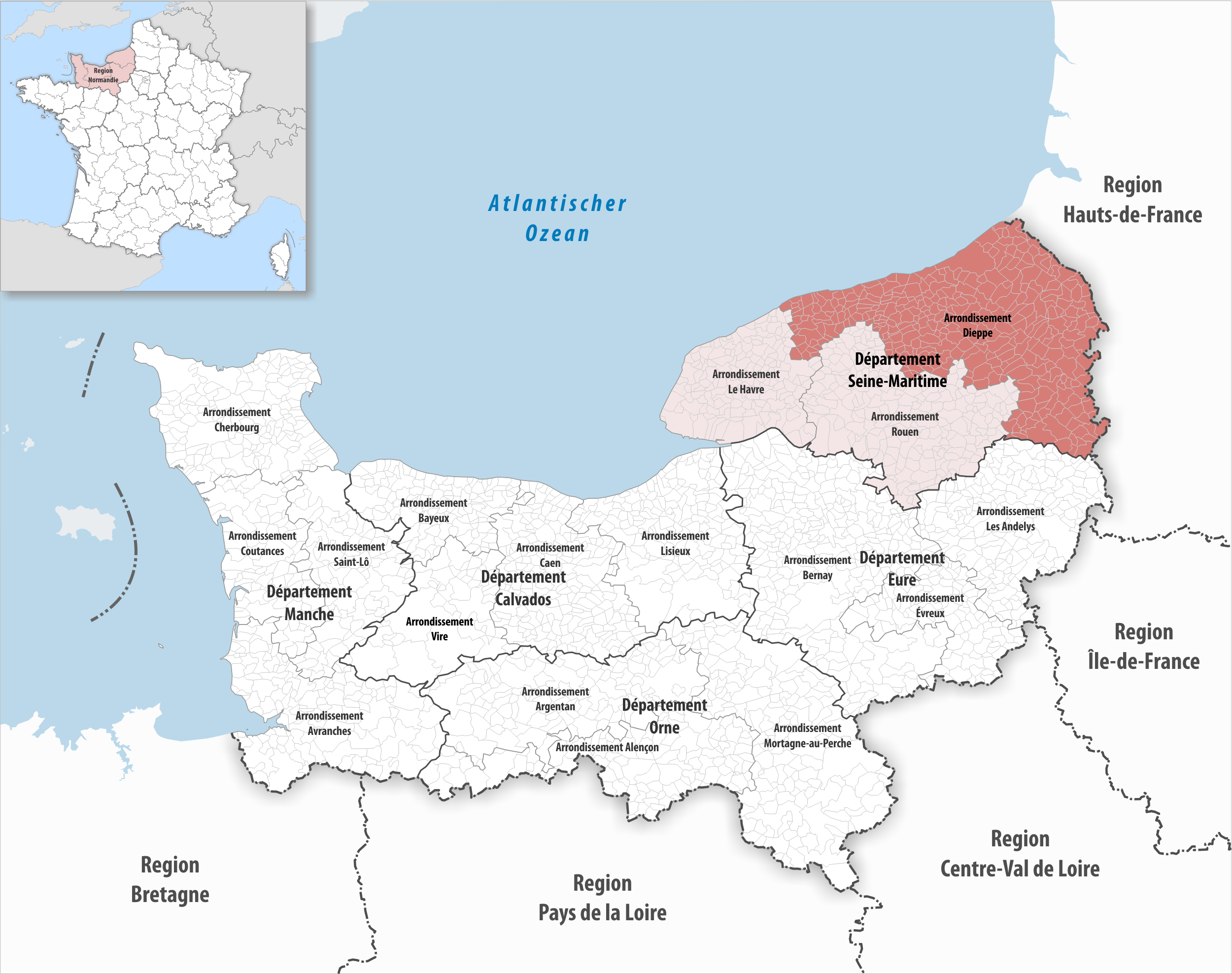 Lage des Arrondissements Dieppe